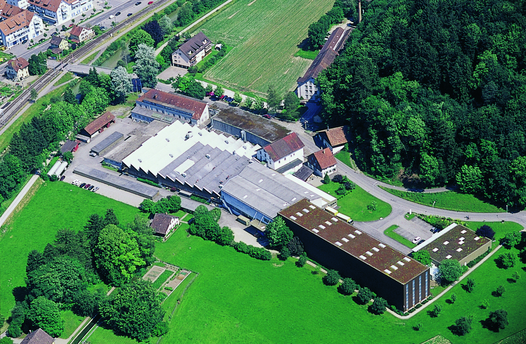 Kuhn Rikon Produktion